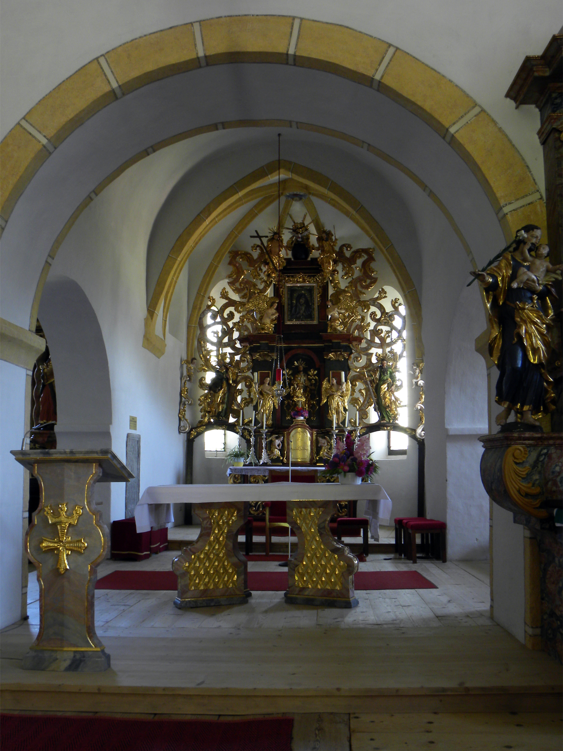 Kath. Pfarrkirche hl. Jakob der Ältere und Friedhof